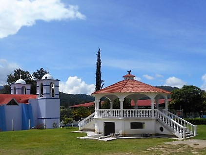 Nuevo quiosco de San Juan Achiutla, Oaxaca, México, 2017.